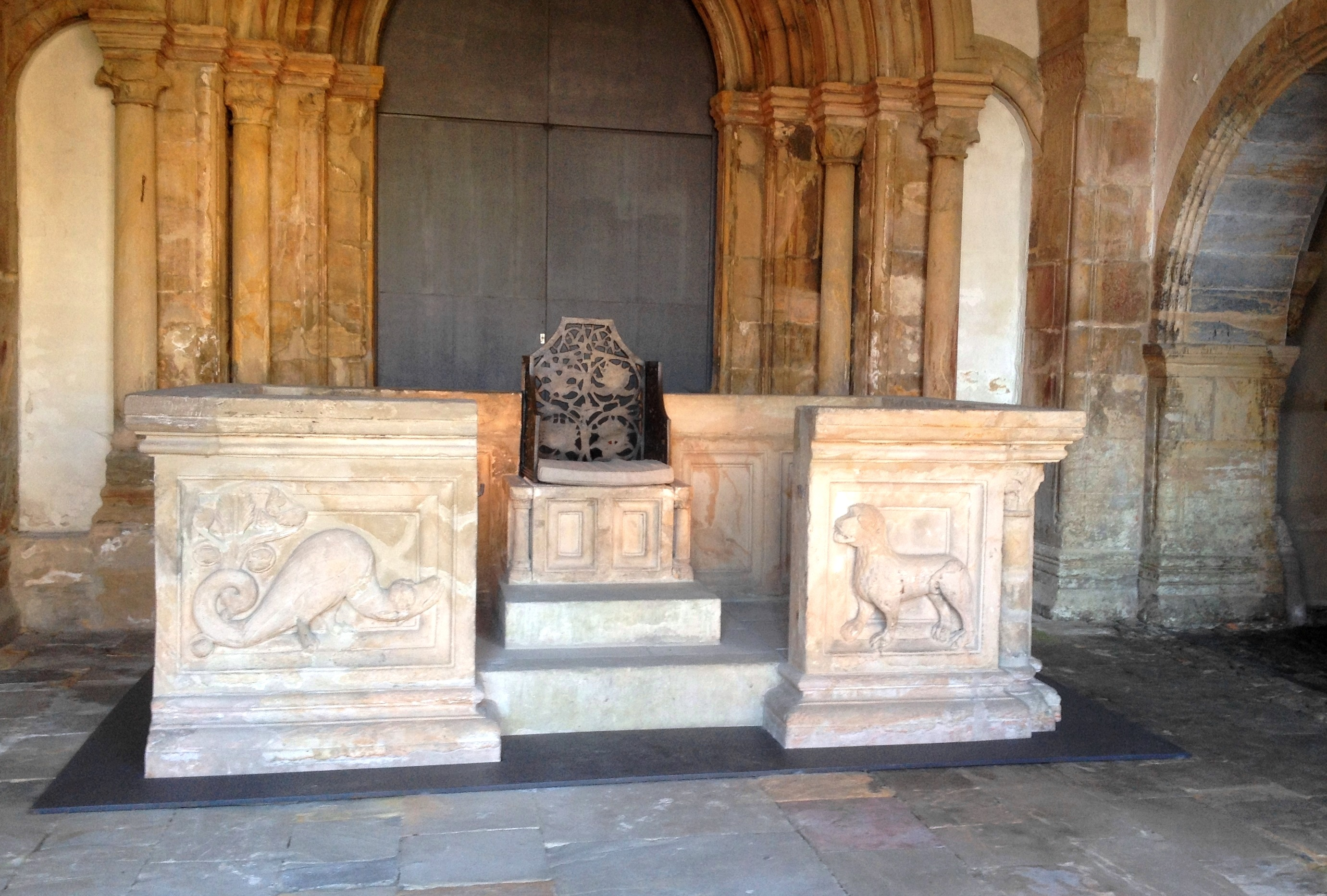 Kaiserstuhl Goslar in der Vorhalle der Pfalzstiftskirche St. Simon und Judas: Sockel und Sandsteinschranken um 1220; Bronzelehnen um 1070 (Replik des Originals im Pfalzgebäude)